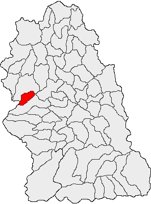 Categorie:Hărţi ale judeţului Hunedoara